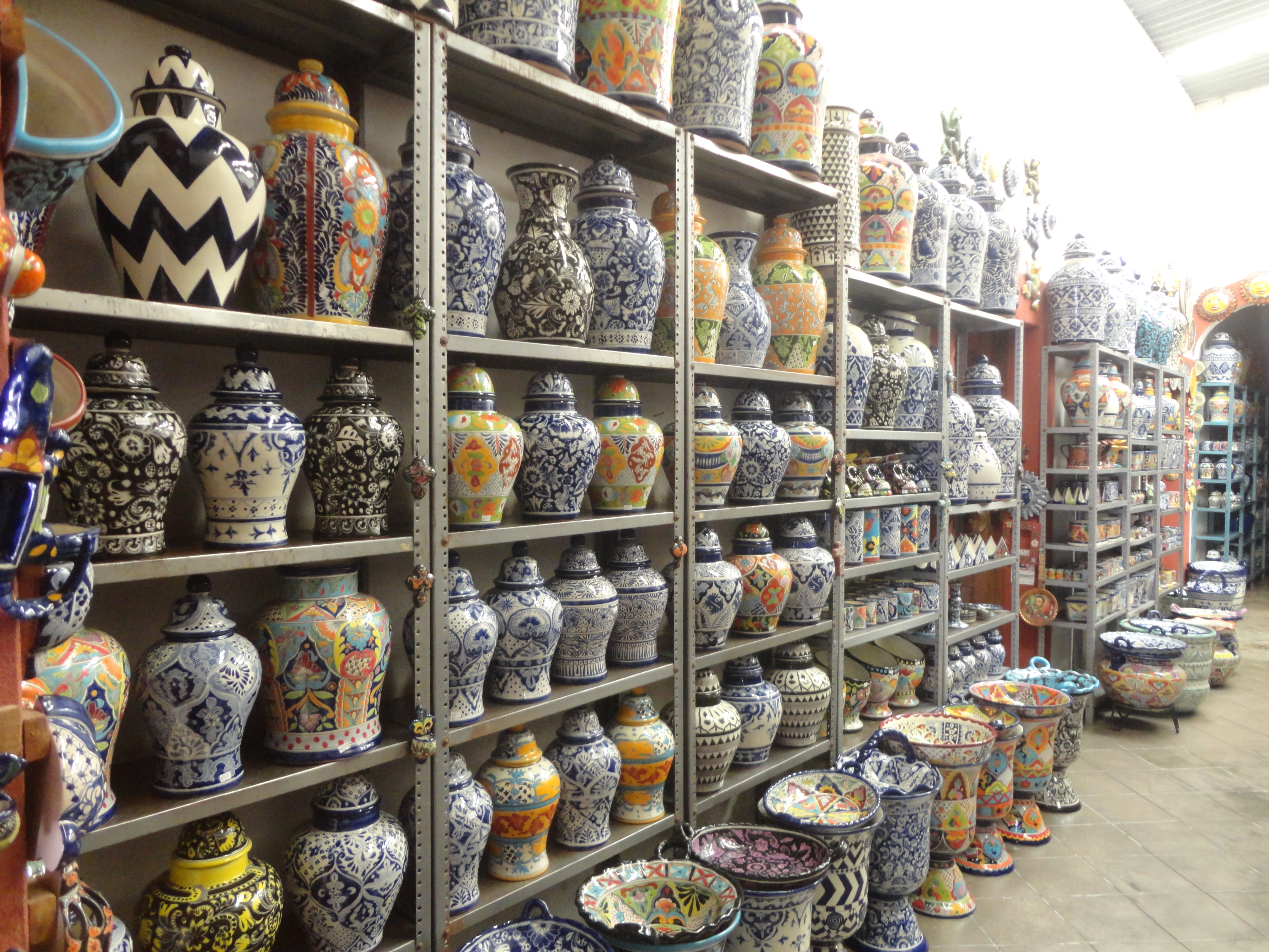 Cerámica vidriada de Dolores Hidalgo, Guanajuato, México.